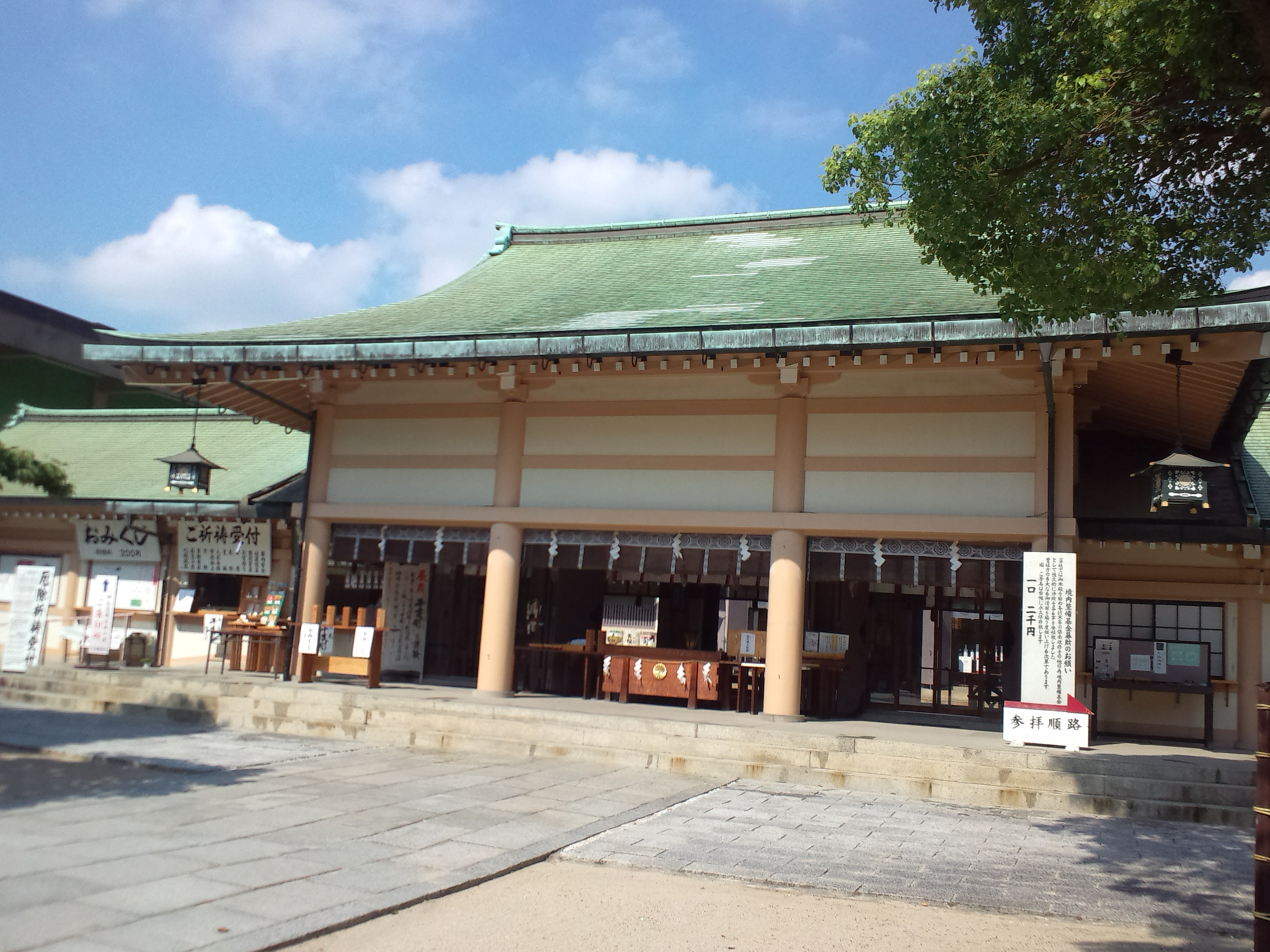 生國魂神社（拝殿）